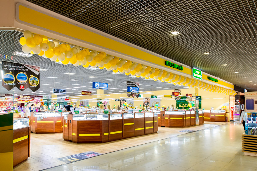 Укрзолото в Одессі